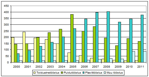 Hiiumaa tööstusharude käive 2000–2011